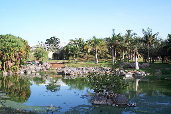 Palmetum de Santa Cruz de Tenerife (Tenerife, España).